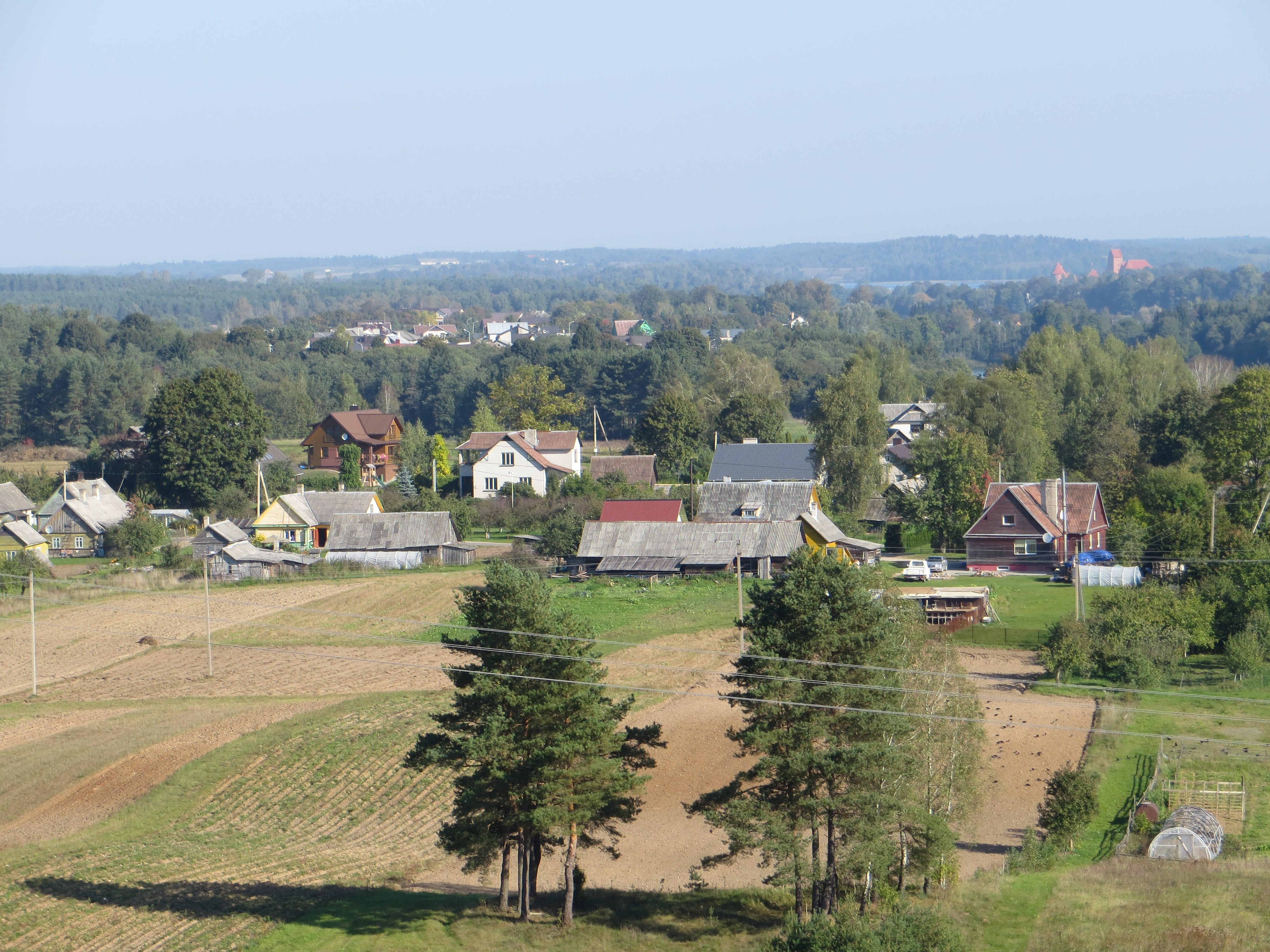 Žukiškės, Lithuania